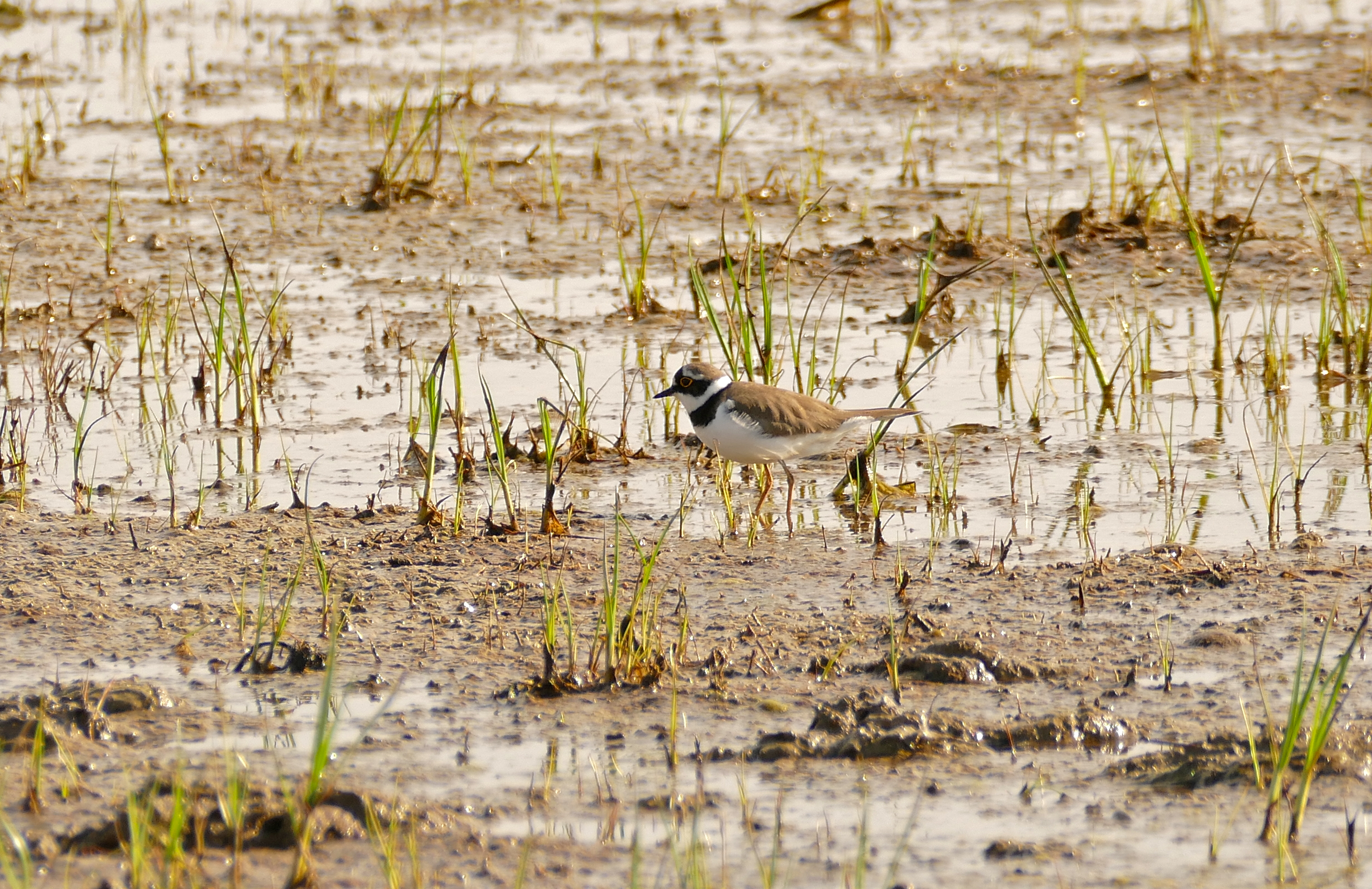 Estanys del Matar, Los Aiguamolls del' Empordà, Castelló d'Empúries, Catalunya, SPAIN